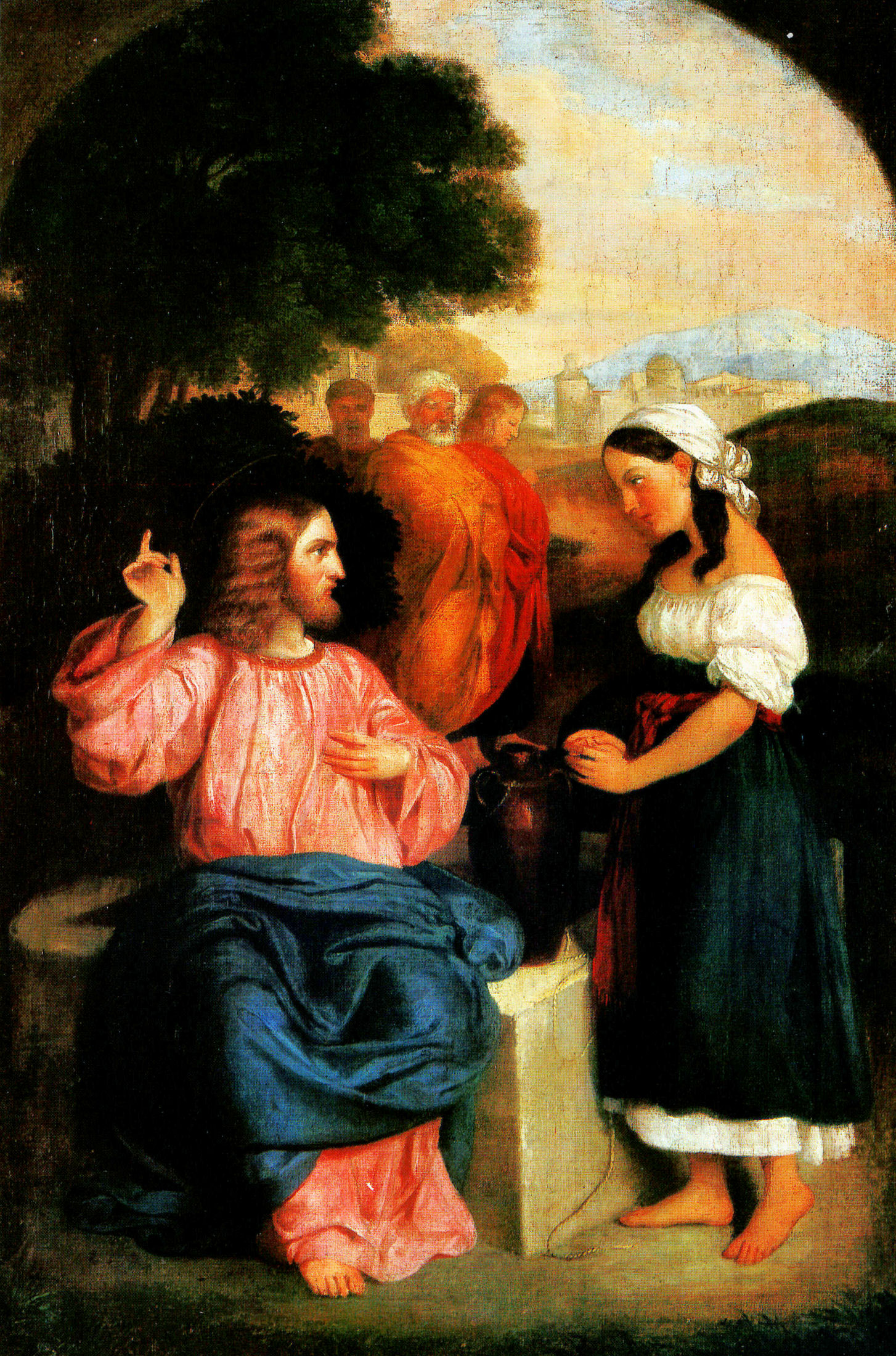 Az eperjesi evangélikus templom Brocky Károly által 1840-ben festett oltárképének másolata. Az oltárkép 1913-ban tűzvész áldozata lett